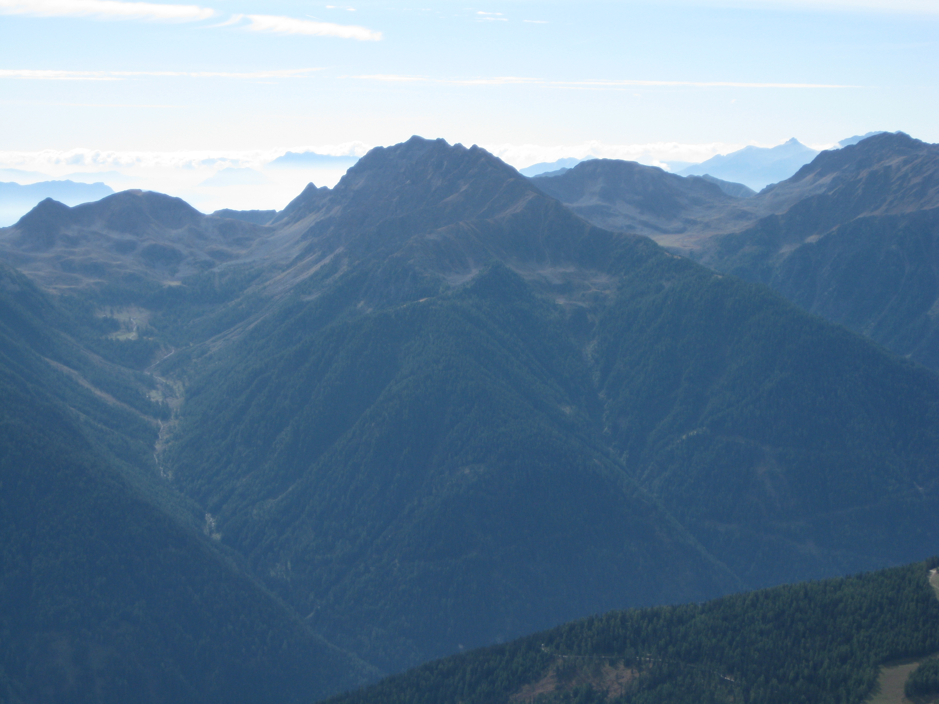 Die Ilmenspitze (auch Ilmspitze) von Norden, vorgelagert die Auerbergspitzen